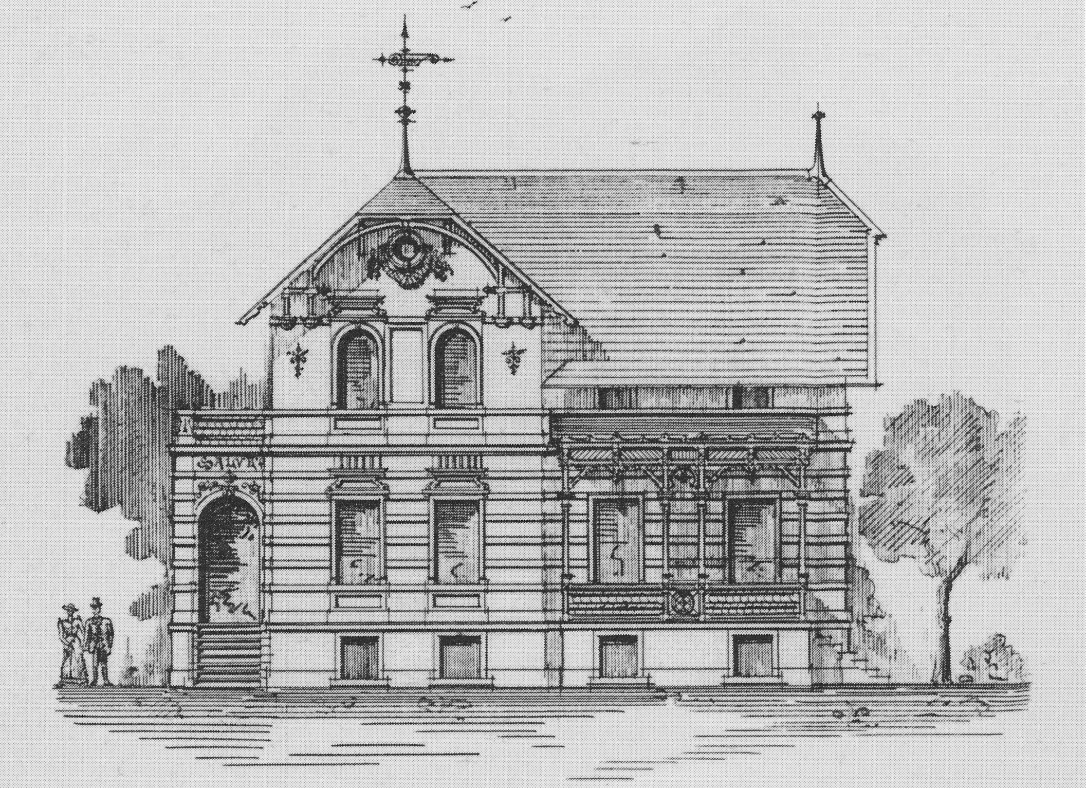 Radebeul Mietvilla Wilhelm-Busch-Straße 10 Bauzeichnung 1891